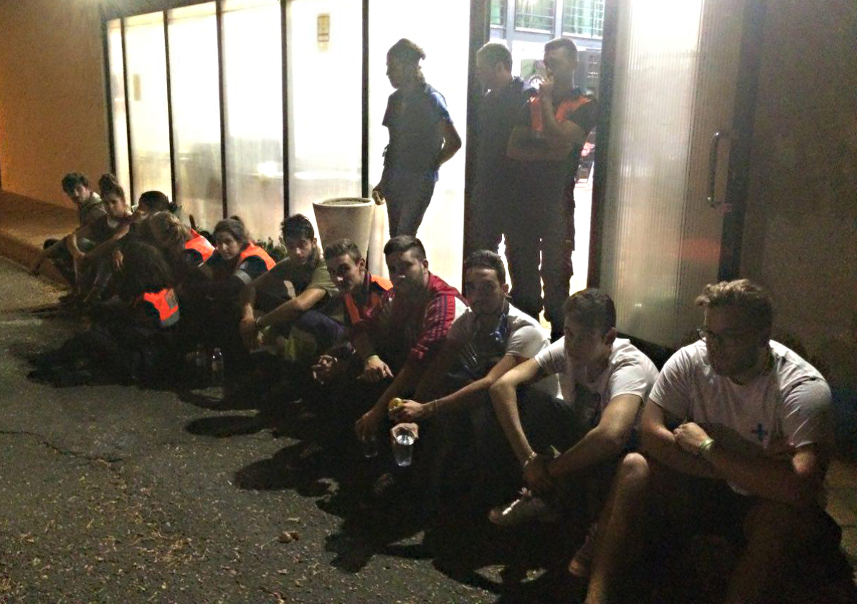 Voluntariado e veciñanza en Nigrán, a madrugada do domingo ao luns